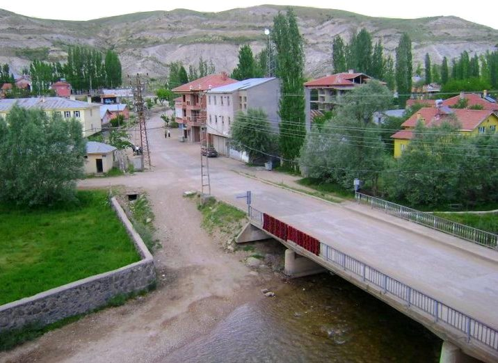 Akçakışla